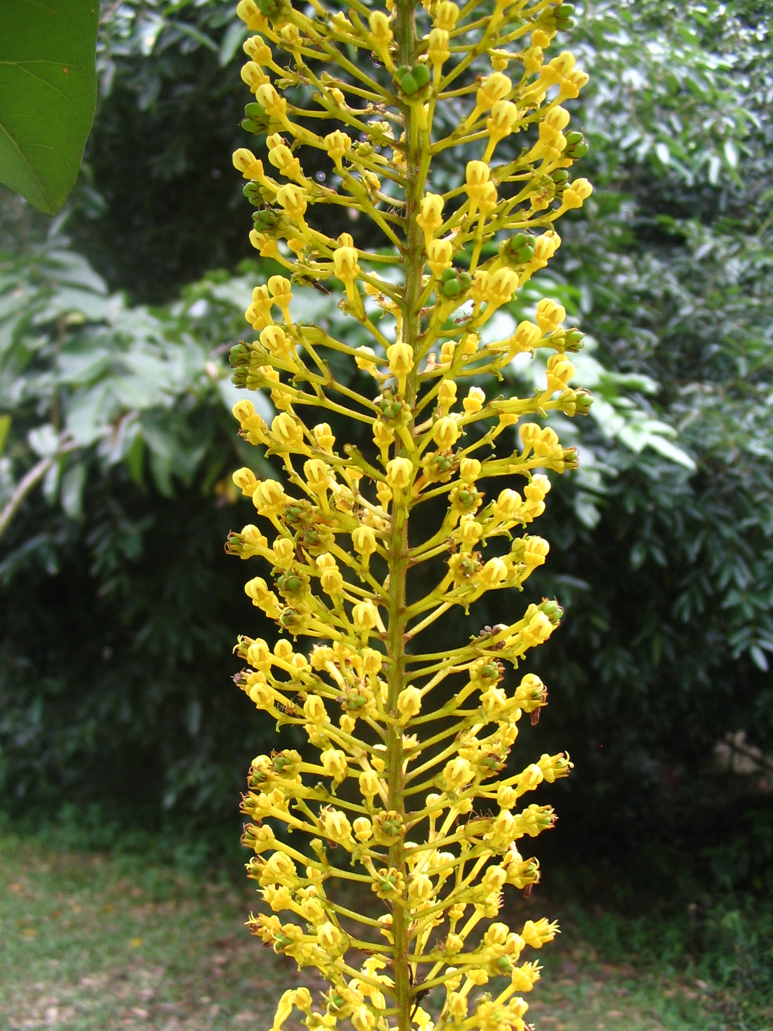 Lophanthera lactescens - détail de l'inflorescence - planté au Forest Research Institute Malaysia , Kepong, Selangor